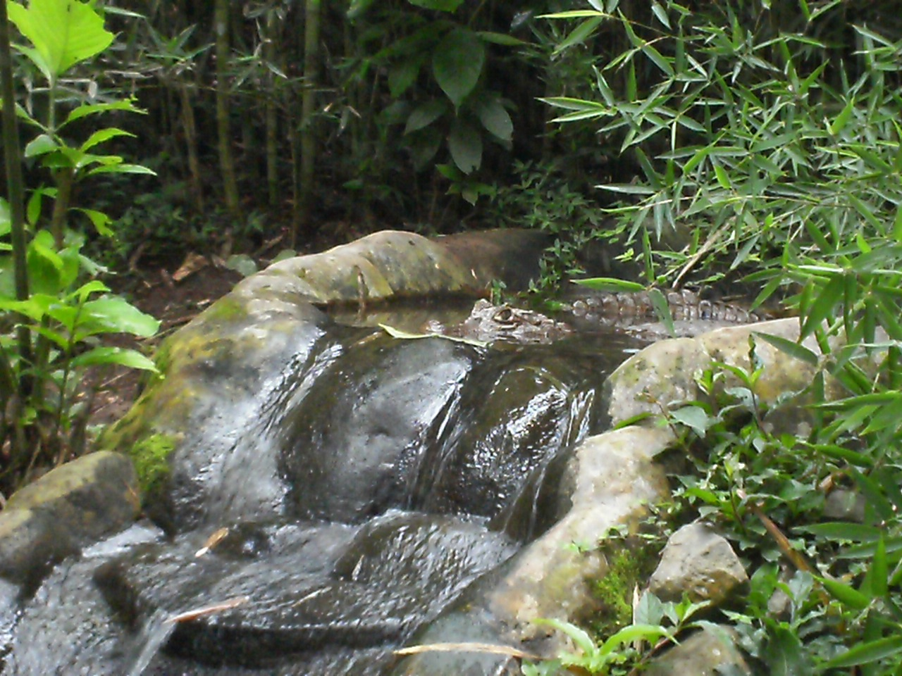 Caiman en su entorno dentro del, Alajuela, Costa Rica